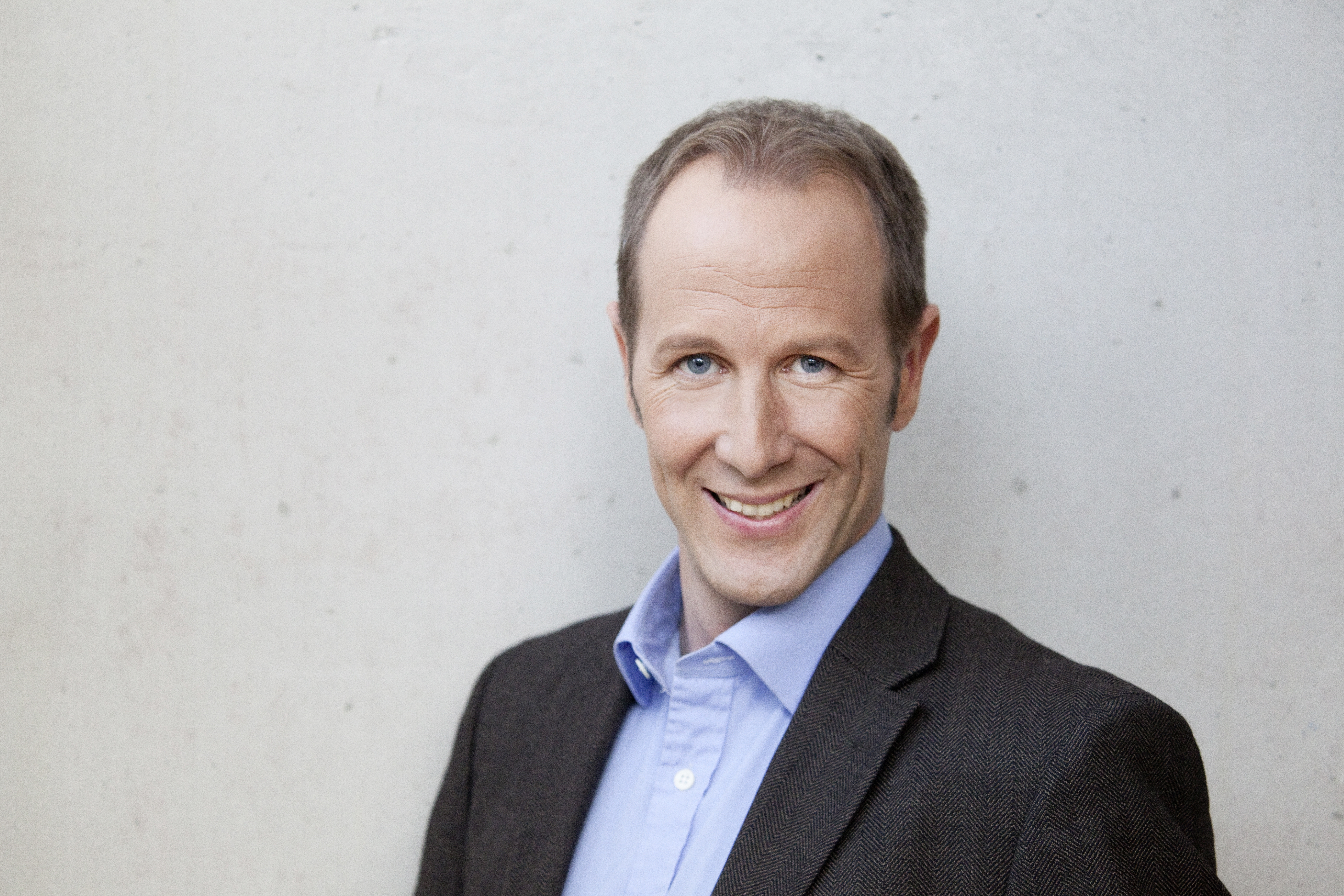 Dr. Daniel Rapp, Oberbürgermeister der Stadt Ravensburg, Deutschland